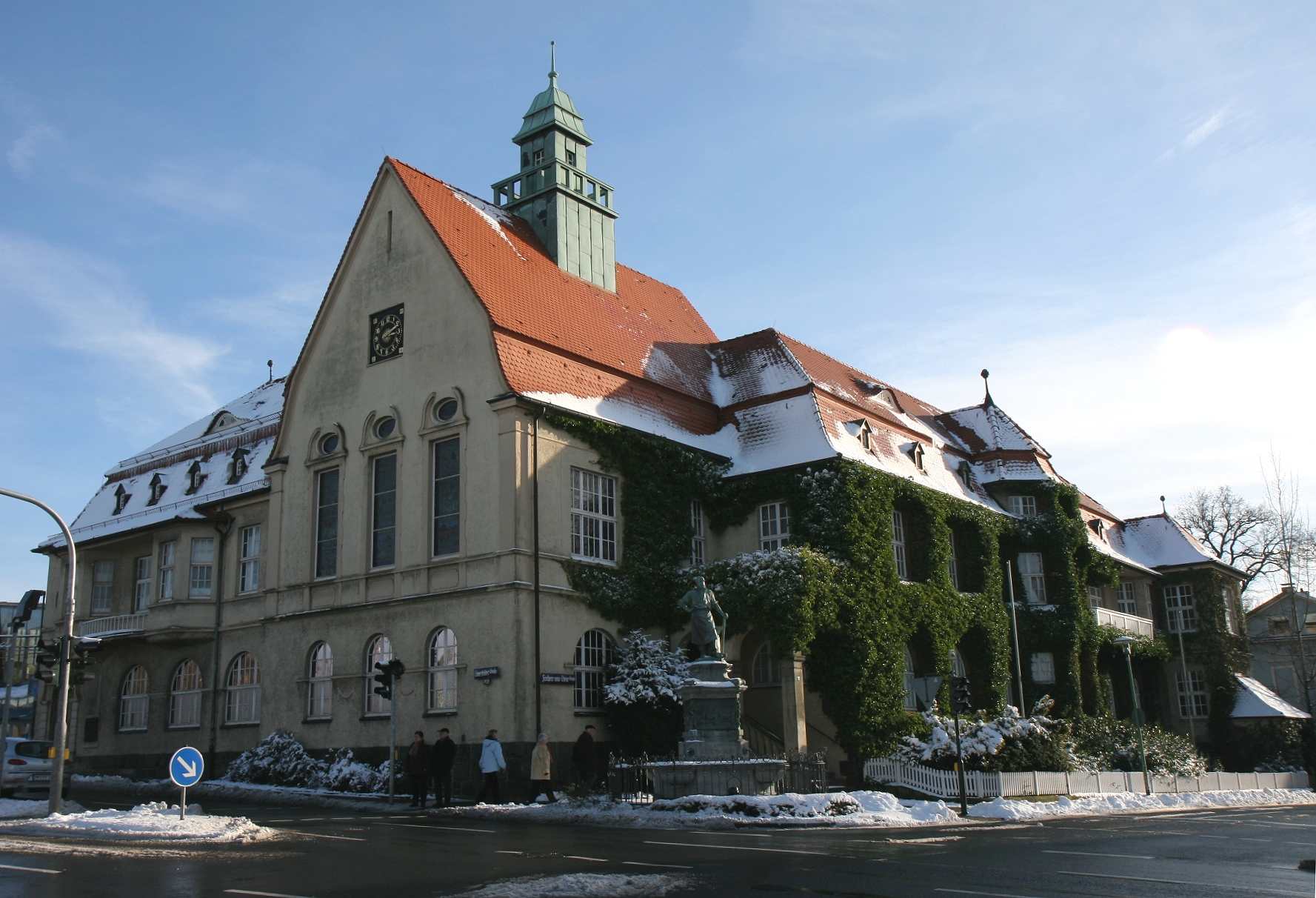 „Altes Amtshaus“ in Lüdenscheid, Freiherr-vom-Stein-Straße 15/Sauerfelder Straße 14. Grundsteinlegung 18. Juni 1909 und seit 7. Juli 1986 unter Denkmalschutz gestellt.